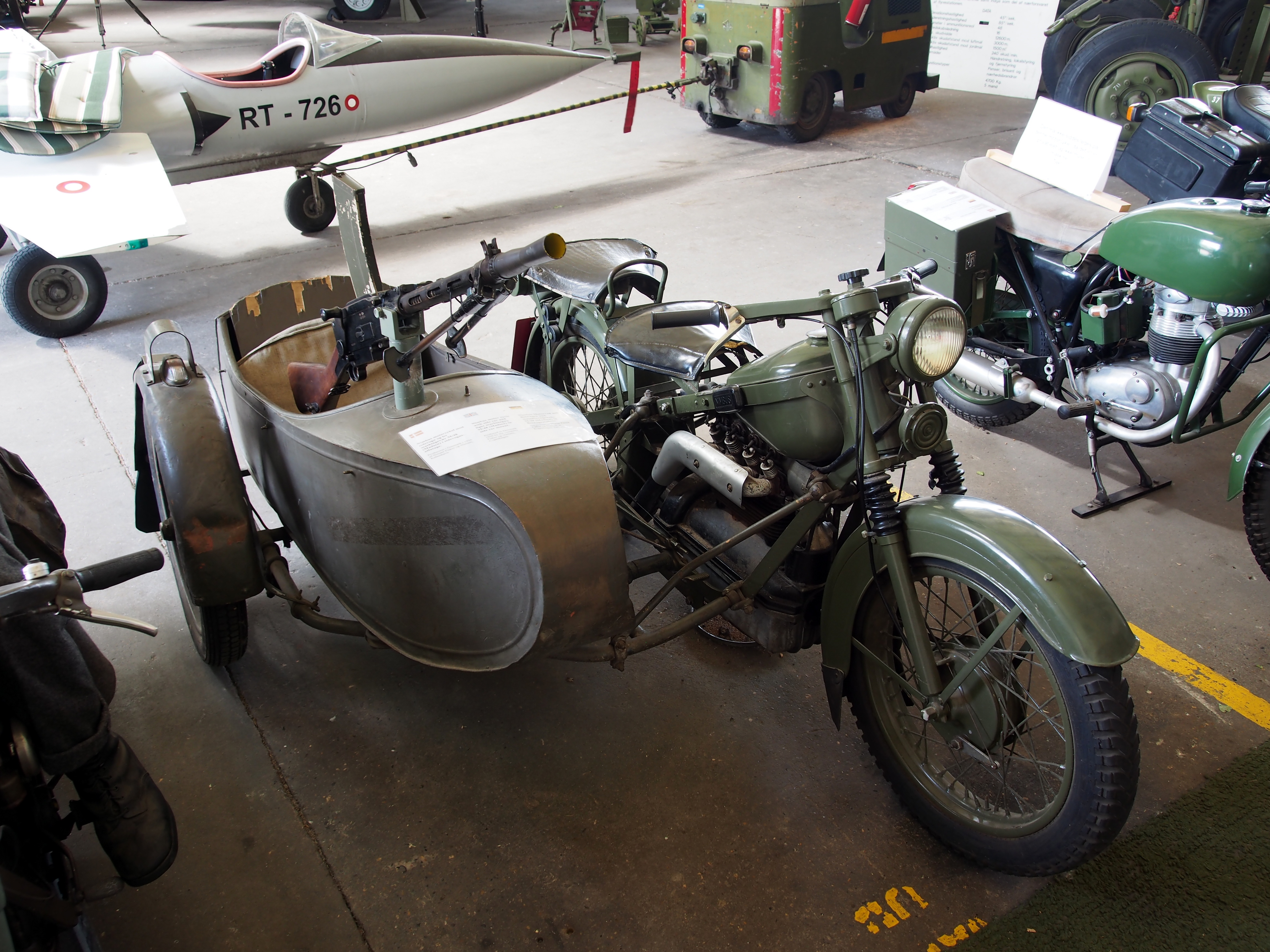 Photographed at Aalborg, Denmark.